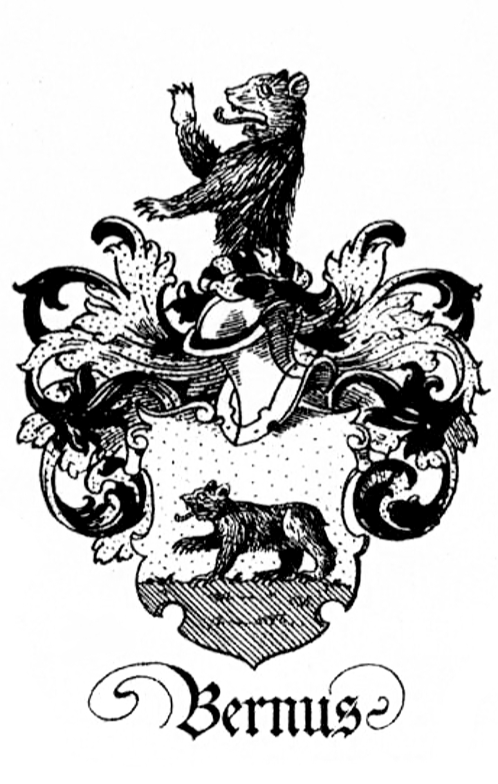 Stammwappen derer Bernus, reformierte, in die Reichsstadt Frankfurt eingewanderte Kaufmannsfamilie